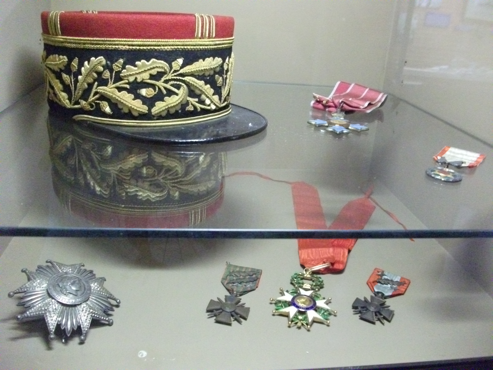 Képi et décorations de François Sevez conservés au Musée de la Reddition de Reims où il était témoin pour de Gaulle au SHAEF